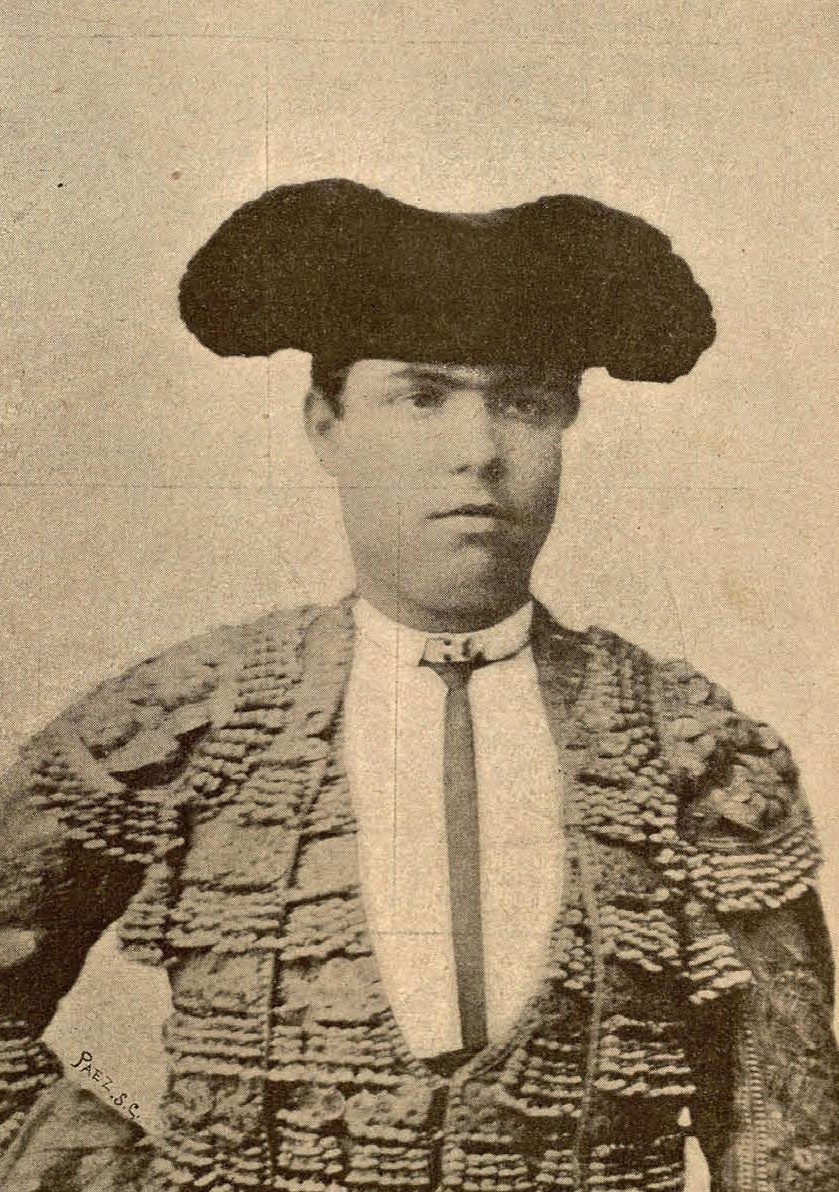 Juan Gómez de Lesaca. Pan y Toros. Revista ilustrada, Madrid, 19 de octubre de 1896